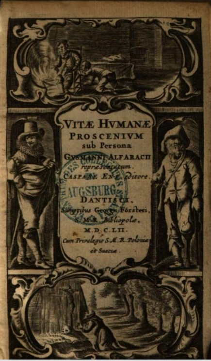 M Alemán, Vitae humanae proscenium (Danzig, 1652 ed.) title page